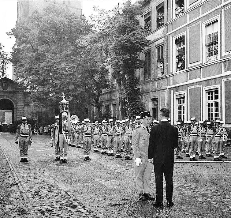 Pas de lieu. Le 2 juin 1965. Vue d'une cérémonie militaire à l'occasion de la nuit Légion et Musique.